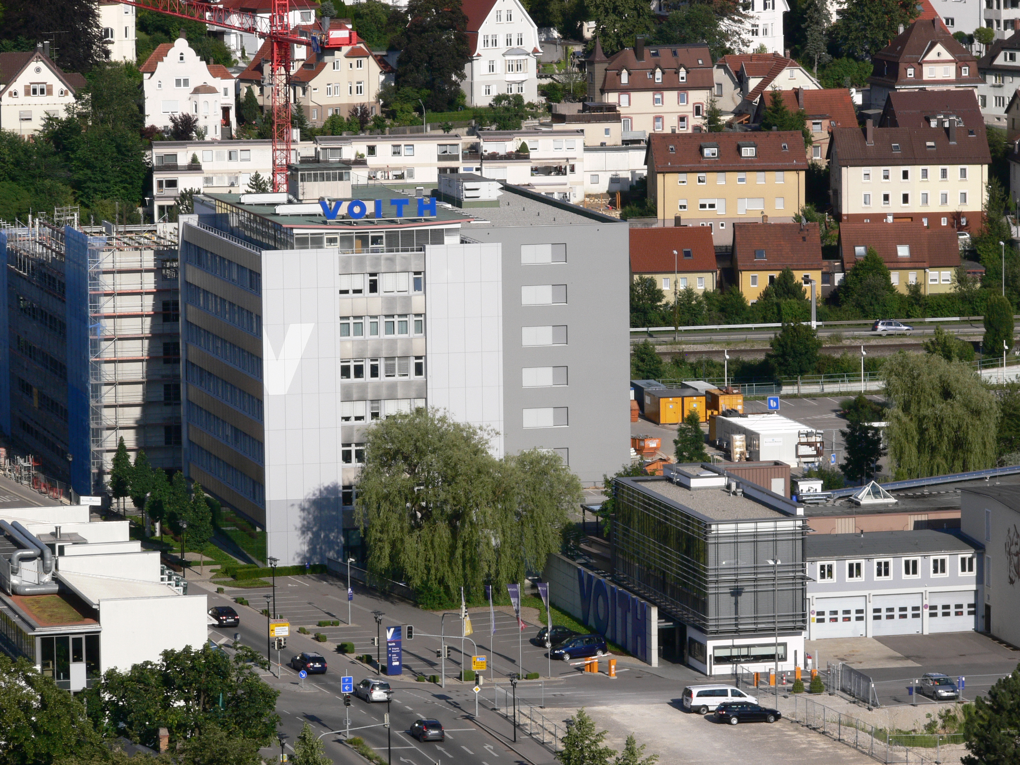 Heidenheim an der Brenz, Blick von Schloss Hellenstein